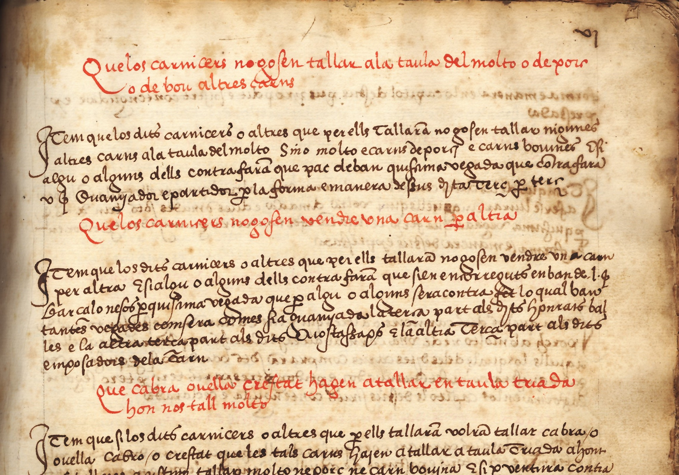 El llibre de la Mostaçafaria és un dels més emblemàtics de l'Arxiu Municipal, ja que constitueix una font d'informació de tot el que es refereix a la vida de la vila, com era el mercat, què s'hi venia i on, a més de fer-hi un extens relat de costums de l'època. El llibre conservat és una compilació feta l'any 1565 de les ordinacions dels segles XIV i XV. Té tapes de fusta recobertes de pell negre amb decoracions florals, amb total de 36 folis de paper. Escrit en català en dues tintes, vermella per als titulars i negra per als textos. Dades tècniques Títol: Ordinacions y Capítols del libre de la Mostaçapharia de la vila de Agualada Data: 1565 Suport material: Paper Mides: 300 x 211 mm